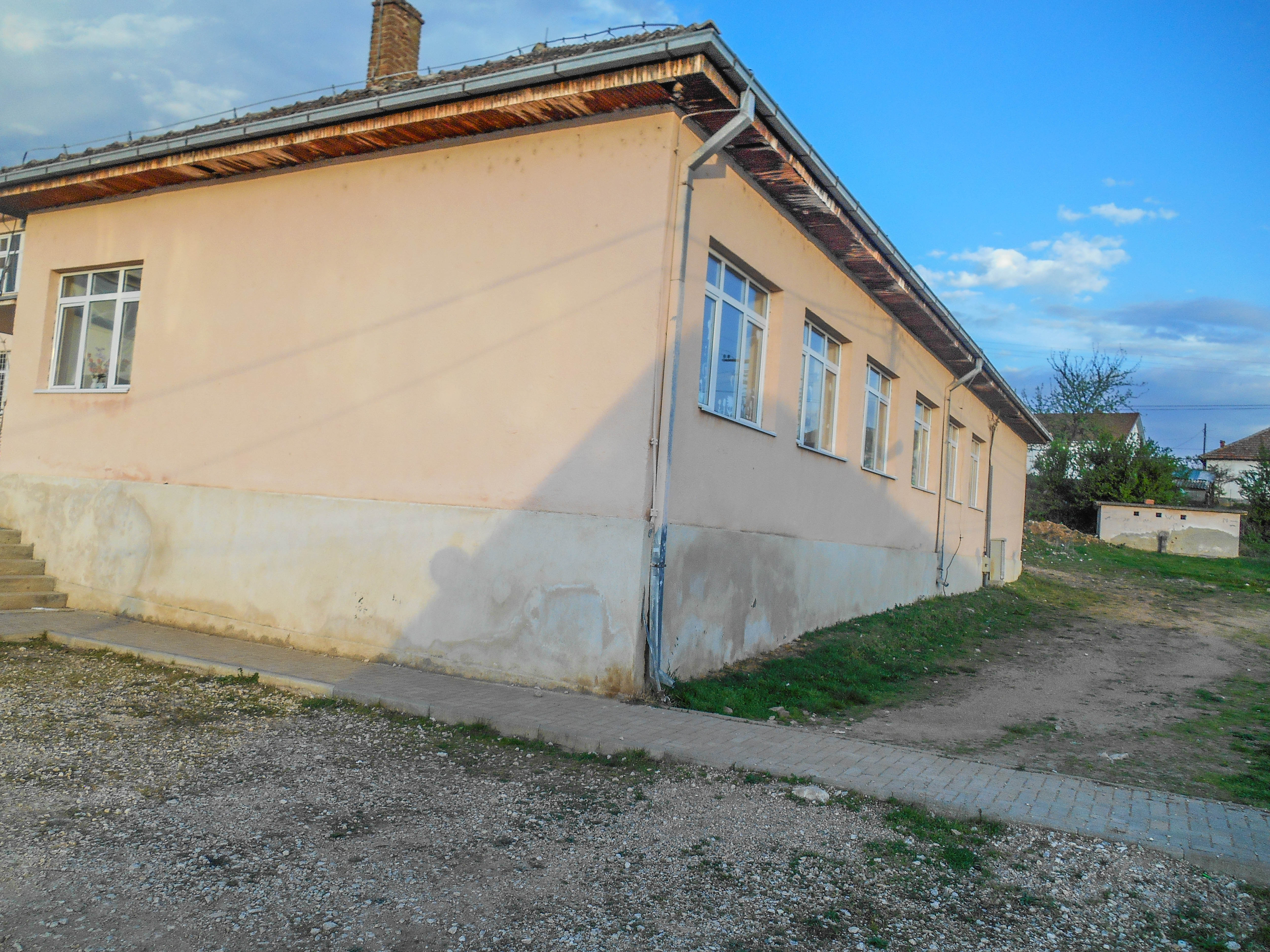 Основно училиште „Св. Кирил и Методиј“ - Иловица